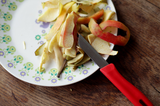 Apple peel